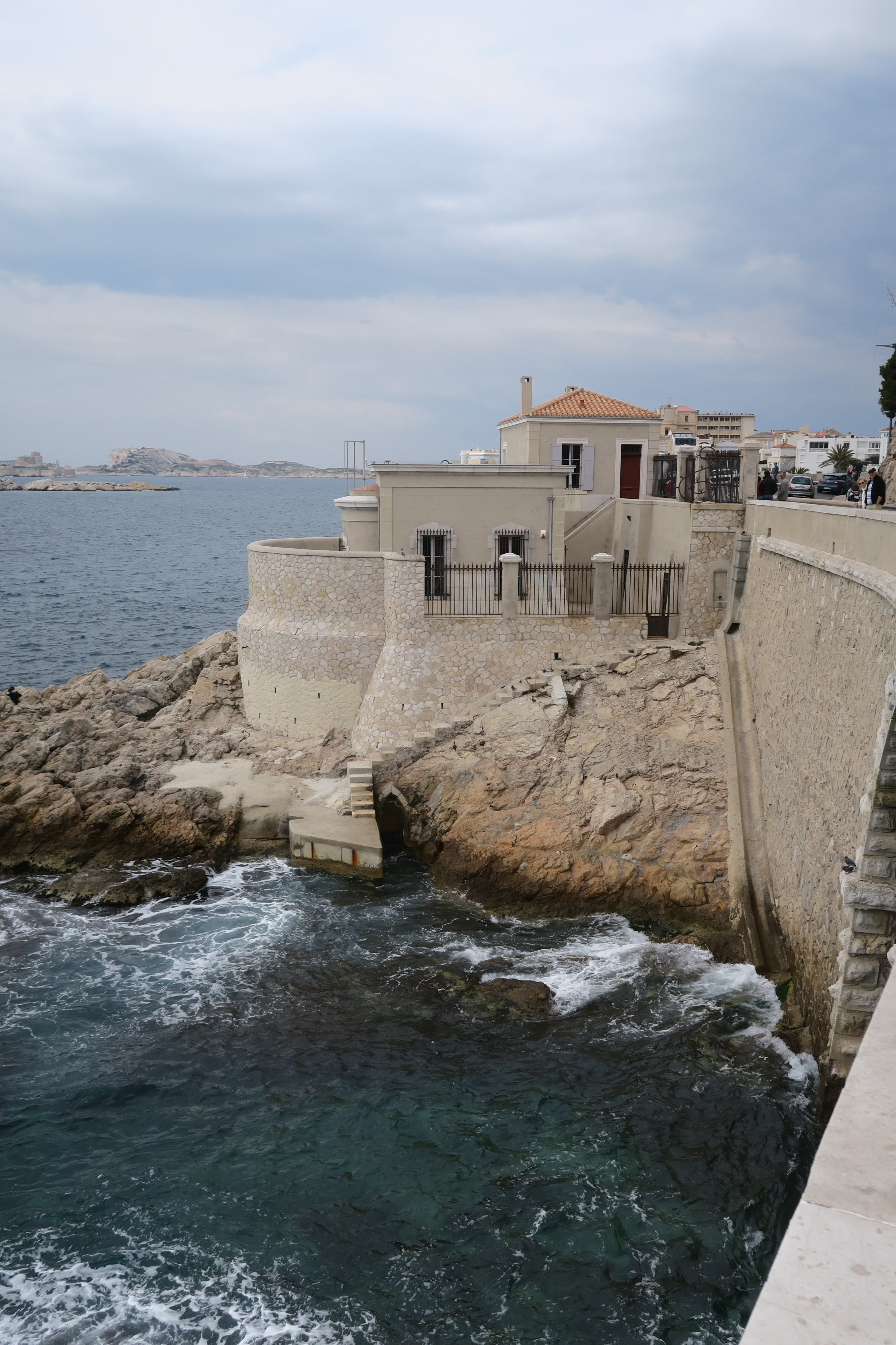 Le marégraphe de Marseille - mars 2018